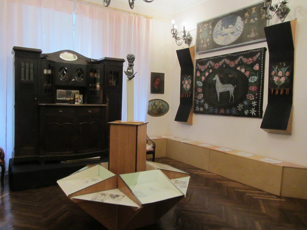 Германавічы.